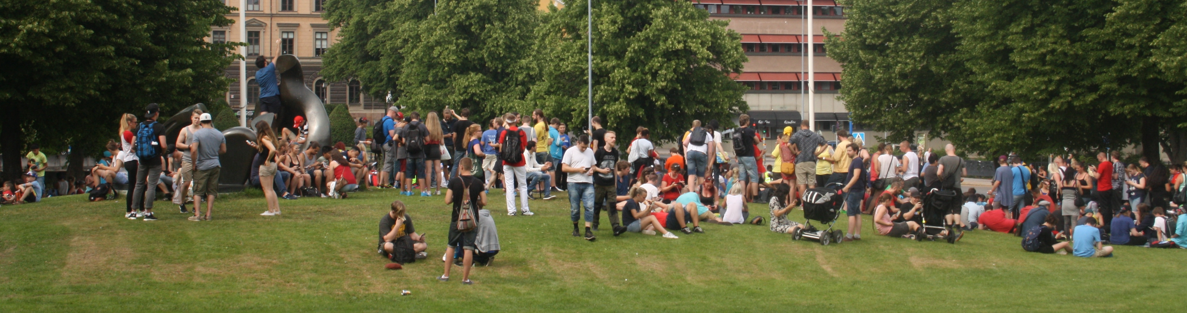 Pokémon Go-spelare i Gävle, Sverige den 24 juli 2016